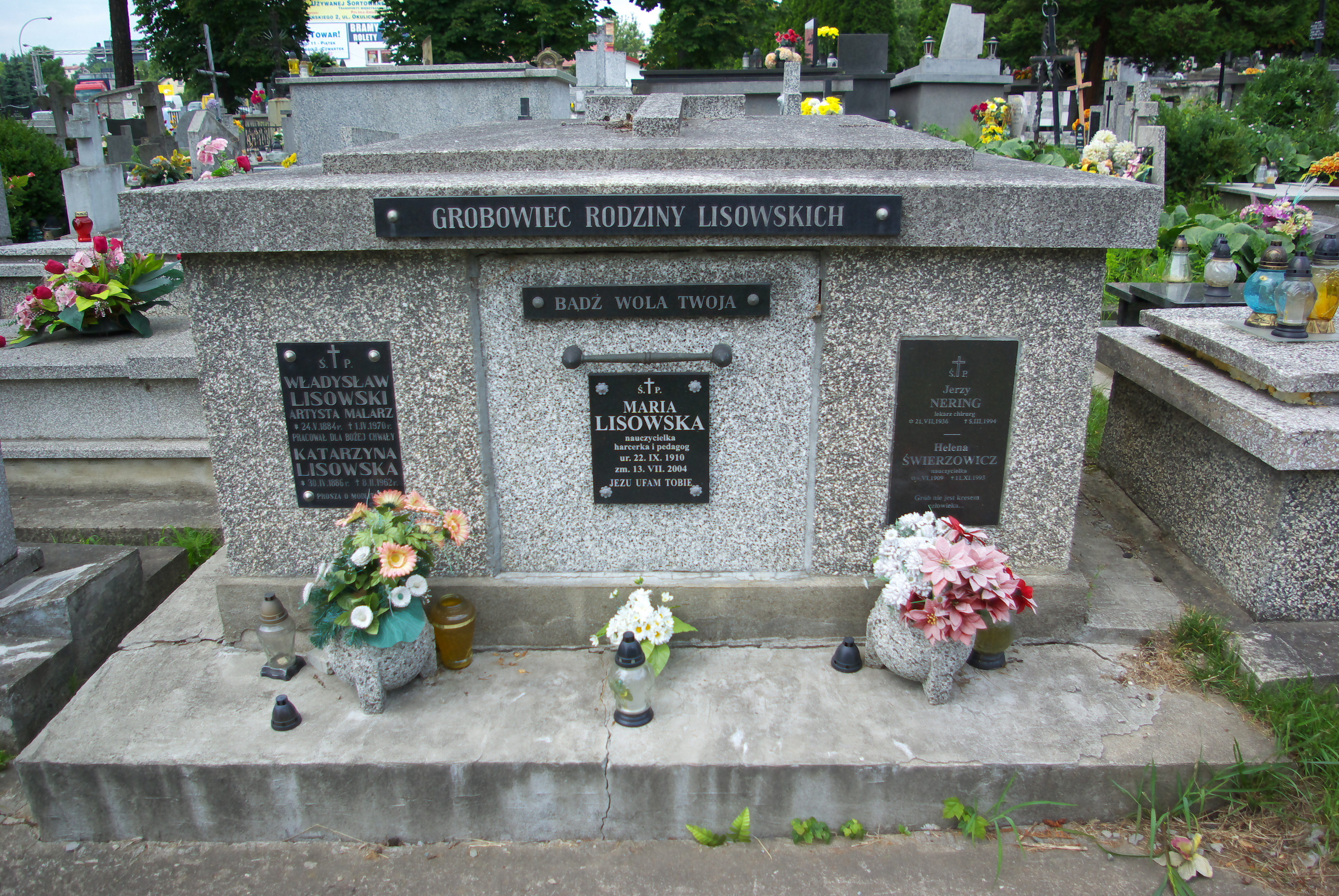 Grobowiec rodzin Lisowskich na Cmentarzu Centralnym w Sanoku. Spoczywa Władysław Lisowski, malarz.